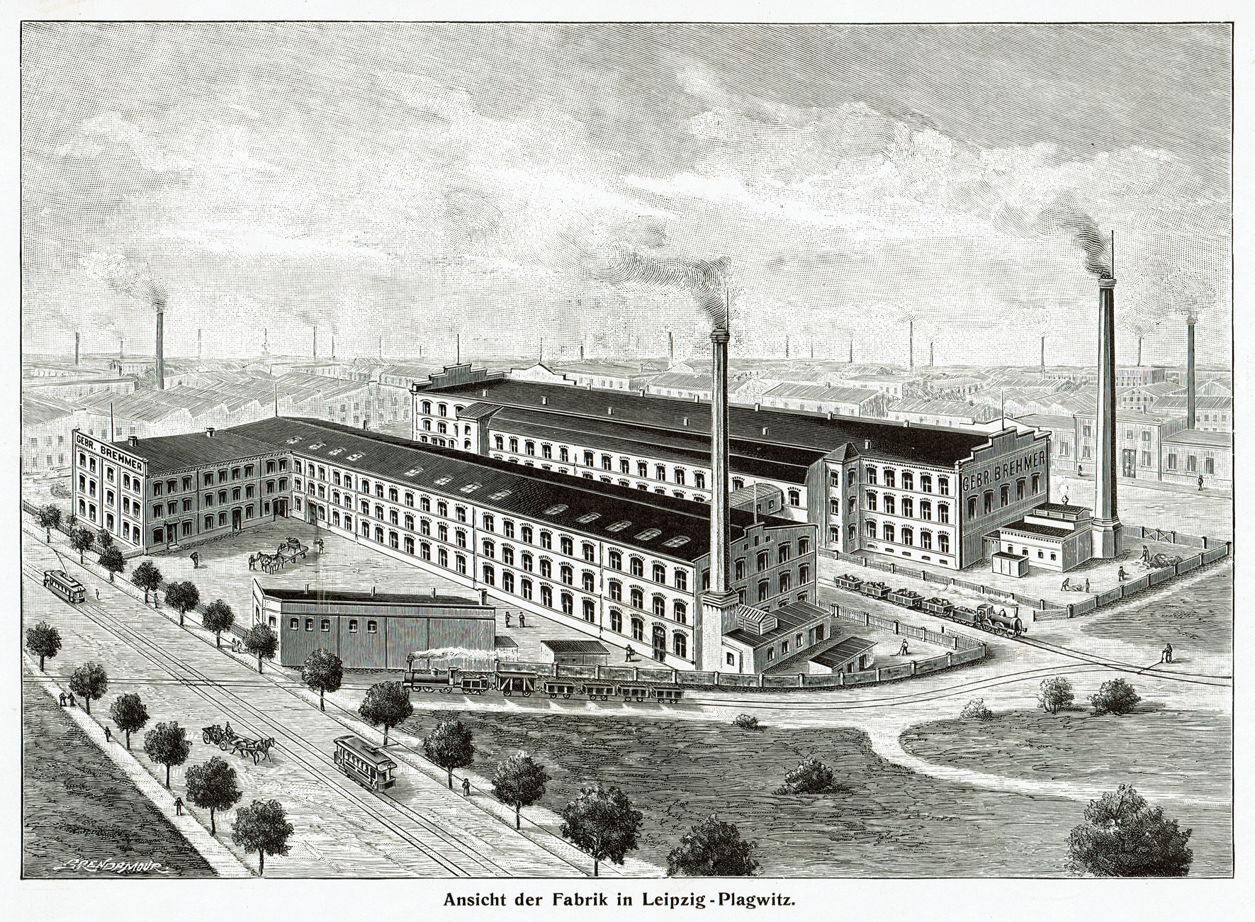 Ansicht der Maschinenfabrik Gebrüder Brehmer in Leipzig-Plagwitz, Richard Brend’amour, vor 1903